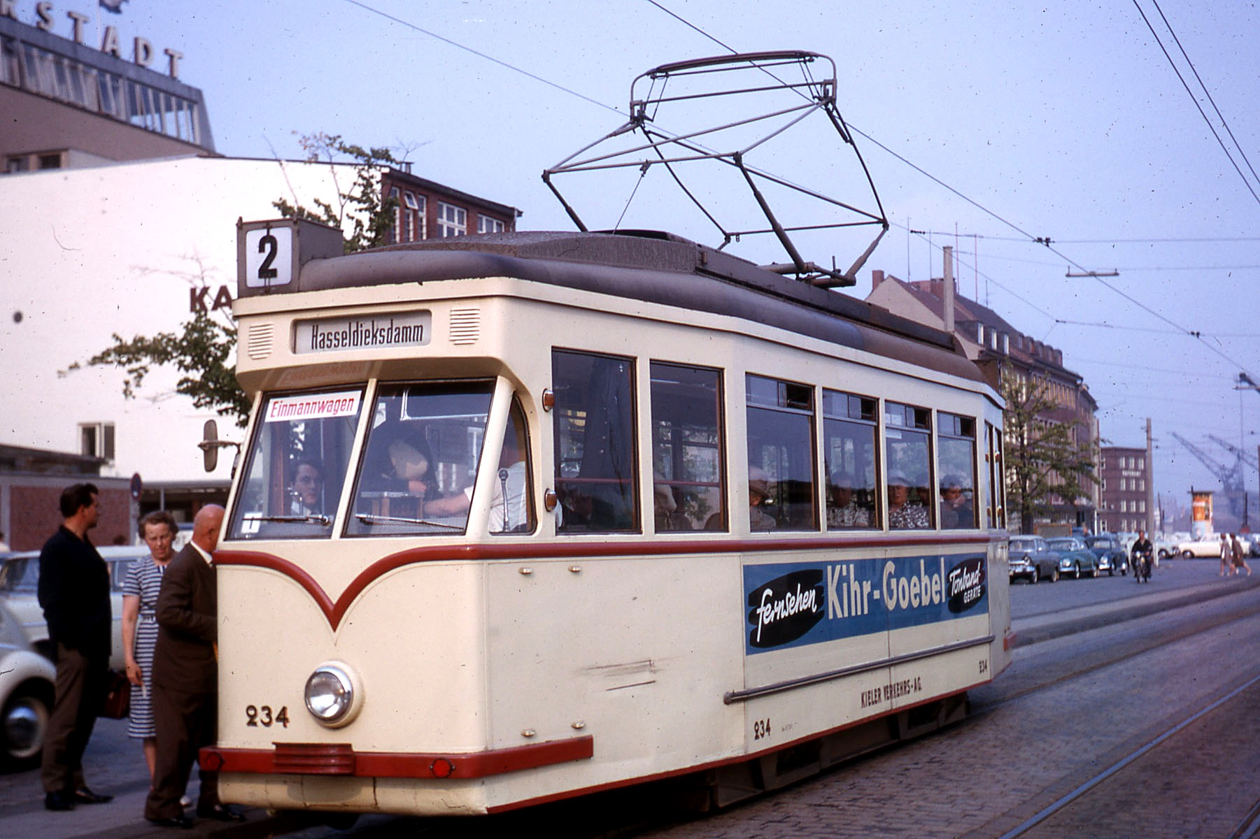 Straßenbahn Kiel, Wagen 234 auf Linie 2